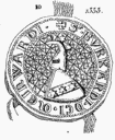 Siegel Geben Schüser Siegel ähnlich dem Siegel wie es Johannes Geben Schüser 1336 verwendet hatte